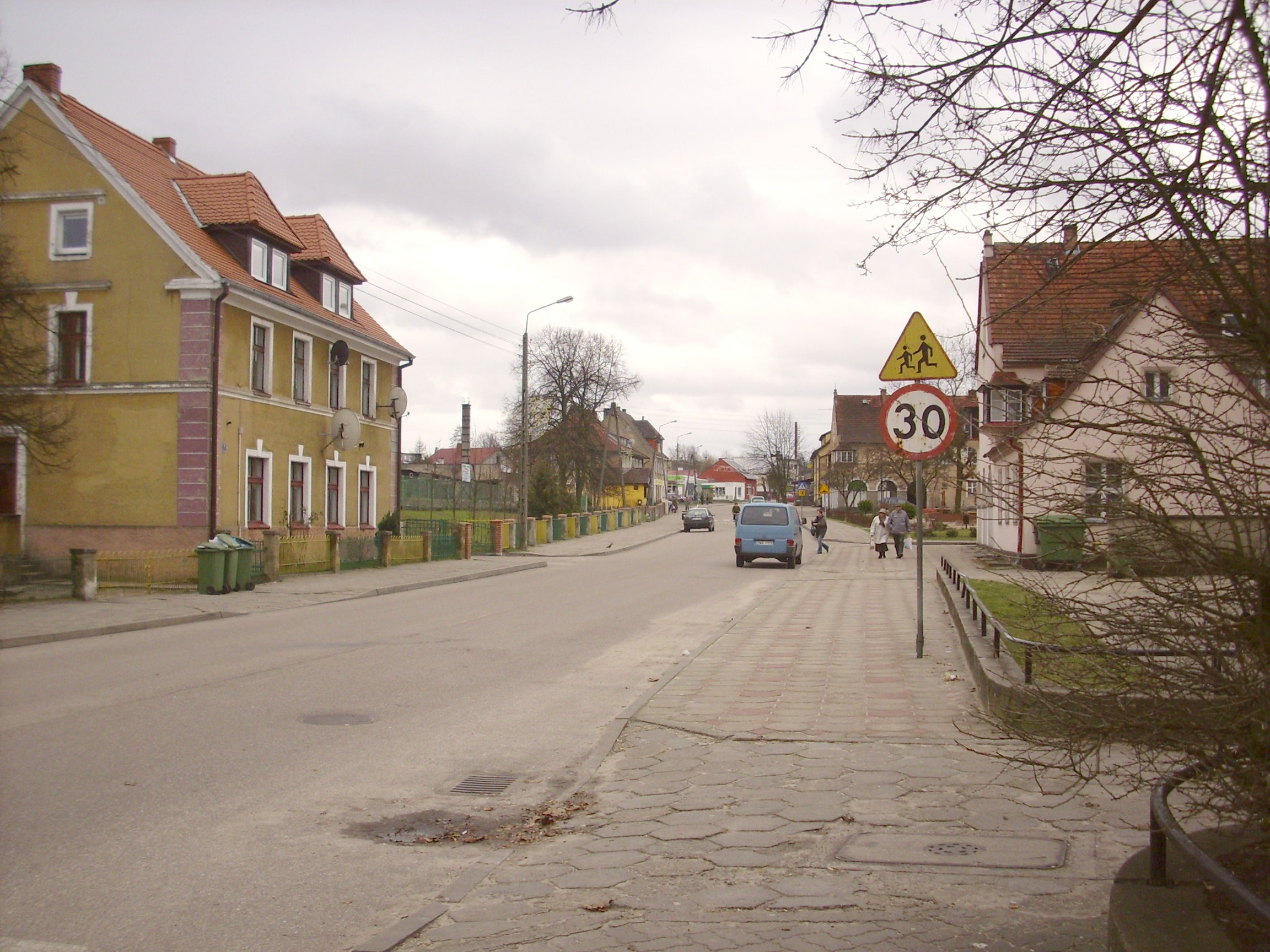 Człopa. Ulica w miasteczku.